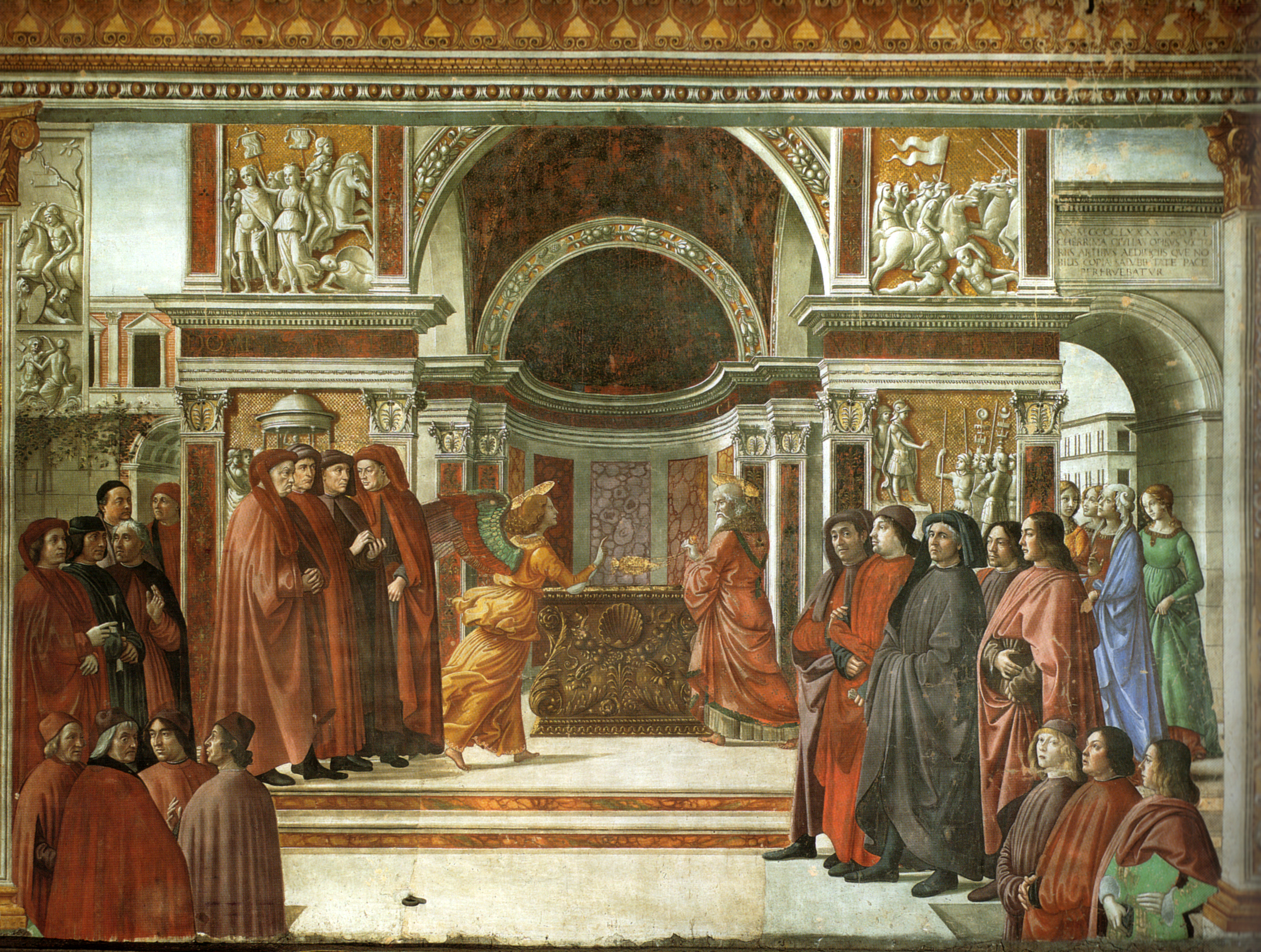 Cappella tornabuoni frescoes in Florence. Annuncio dell'angelo a San Zaccaria.